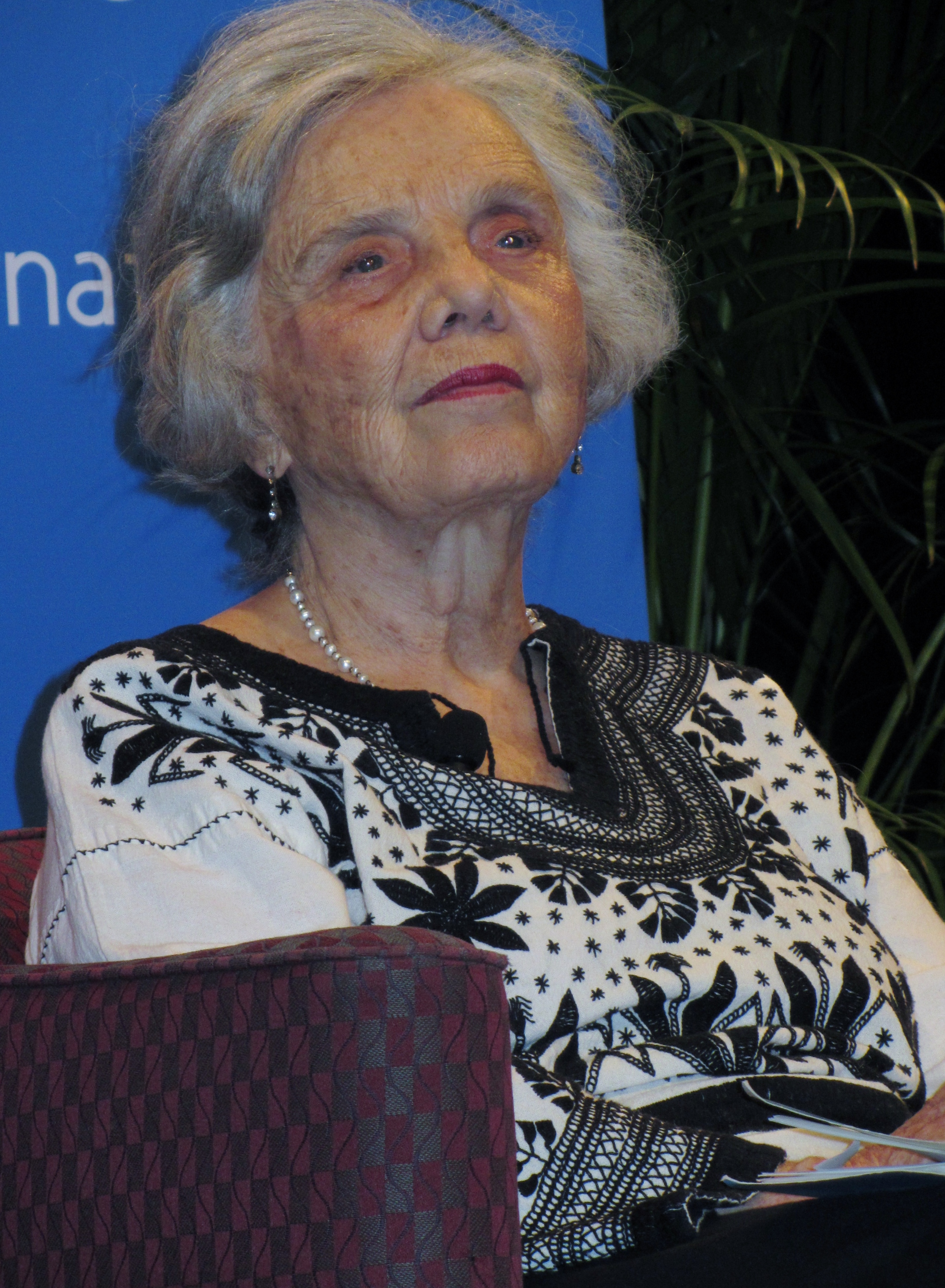 La escritora mexicana Elena Poniatowska en la Feria Internacional del Libro de Miami, 2014